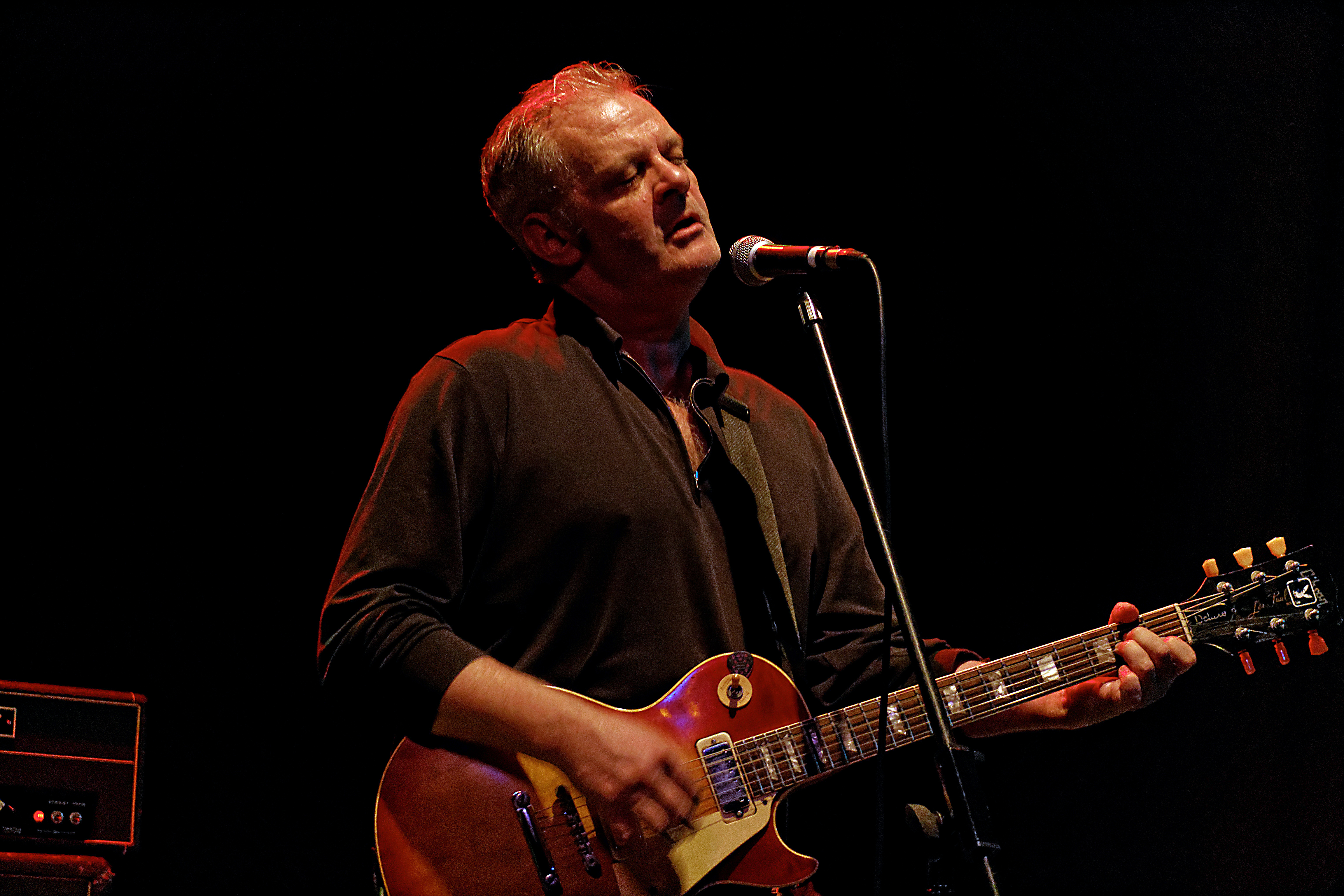 Le groupe Republik de Frank Darcel en showcase à l'occasion de la sortie du premier album le 13 novembre 2015 à la MJC de Morlaix.